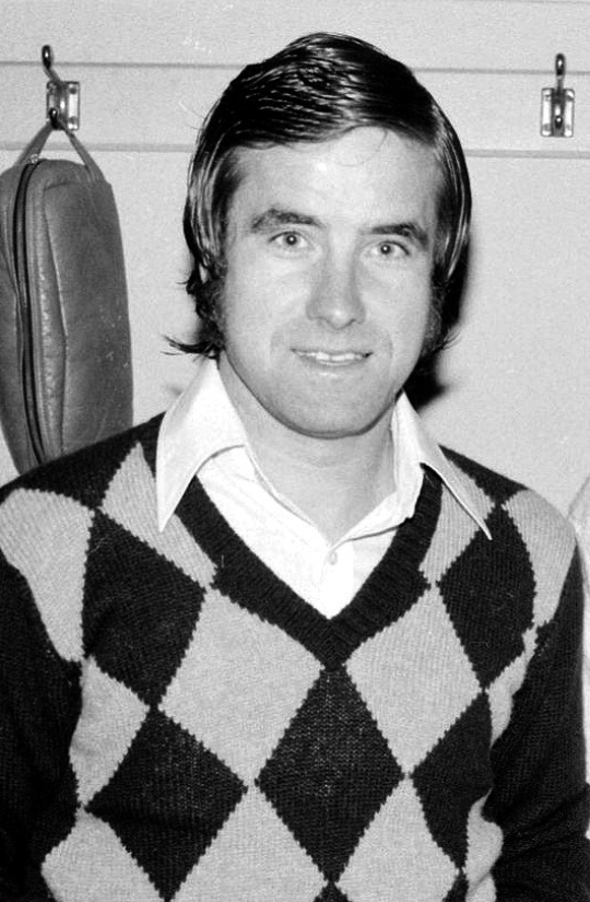 Bernd Patzke en 1972